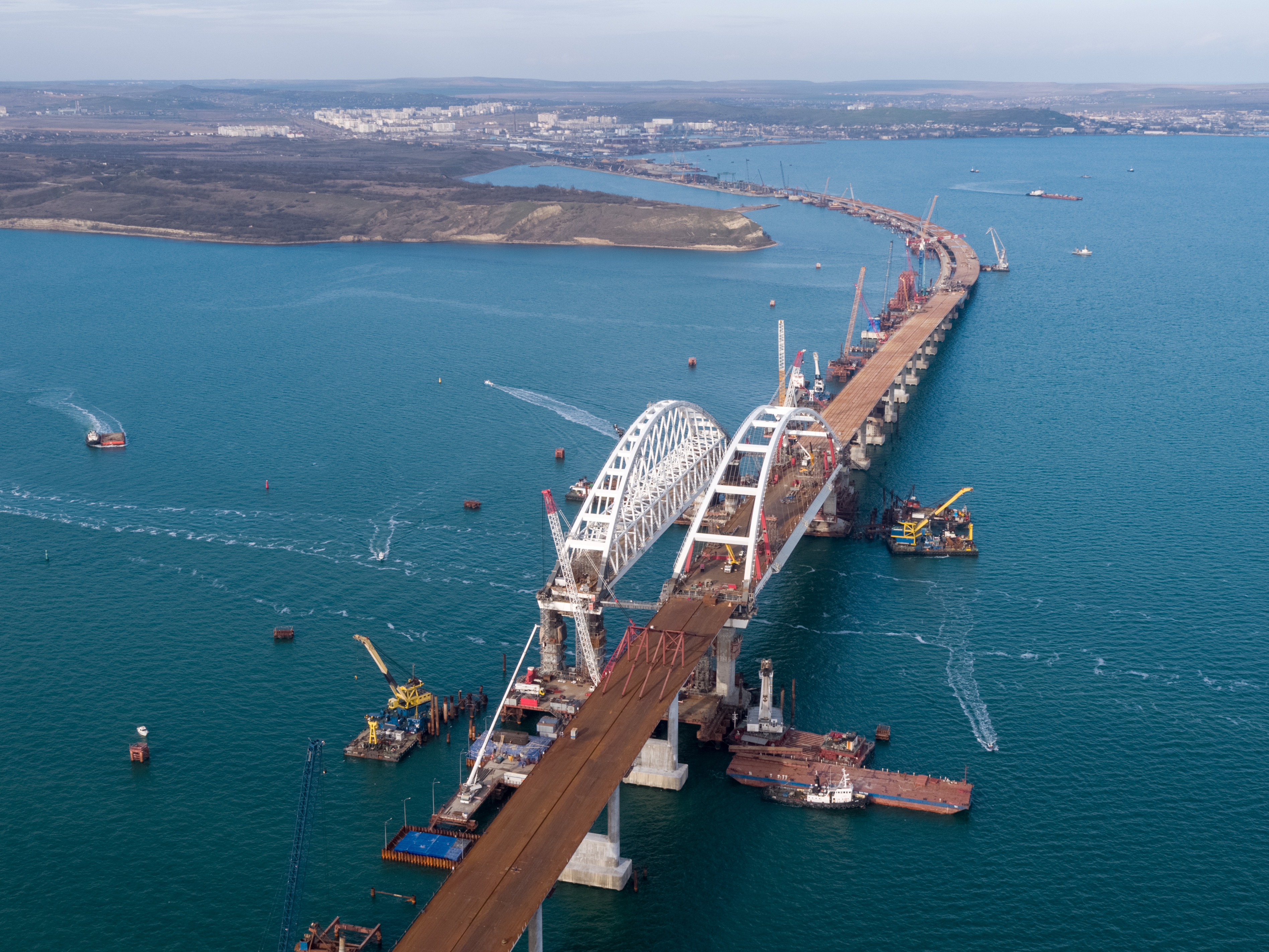 Строительство Крымского моста (Росавтодор)